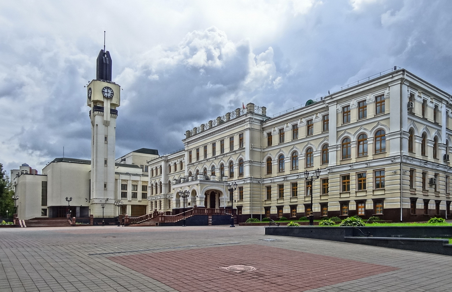 ВИТЕБСК. Дворец нынешнего генерал-губернатора.